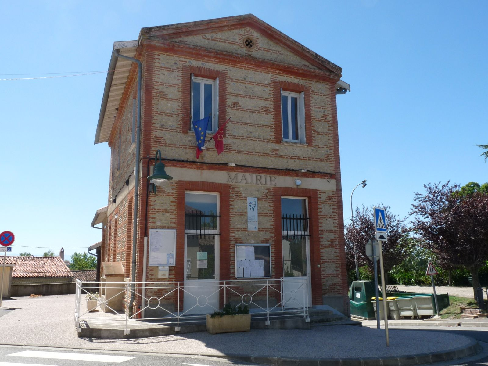 Mairie de Labruyère-Dorsa, Haute-Garonne, France